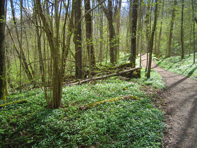 vitsippsblommning i Linnarhults vårskog Foto:Philippe